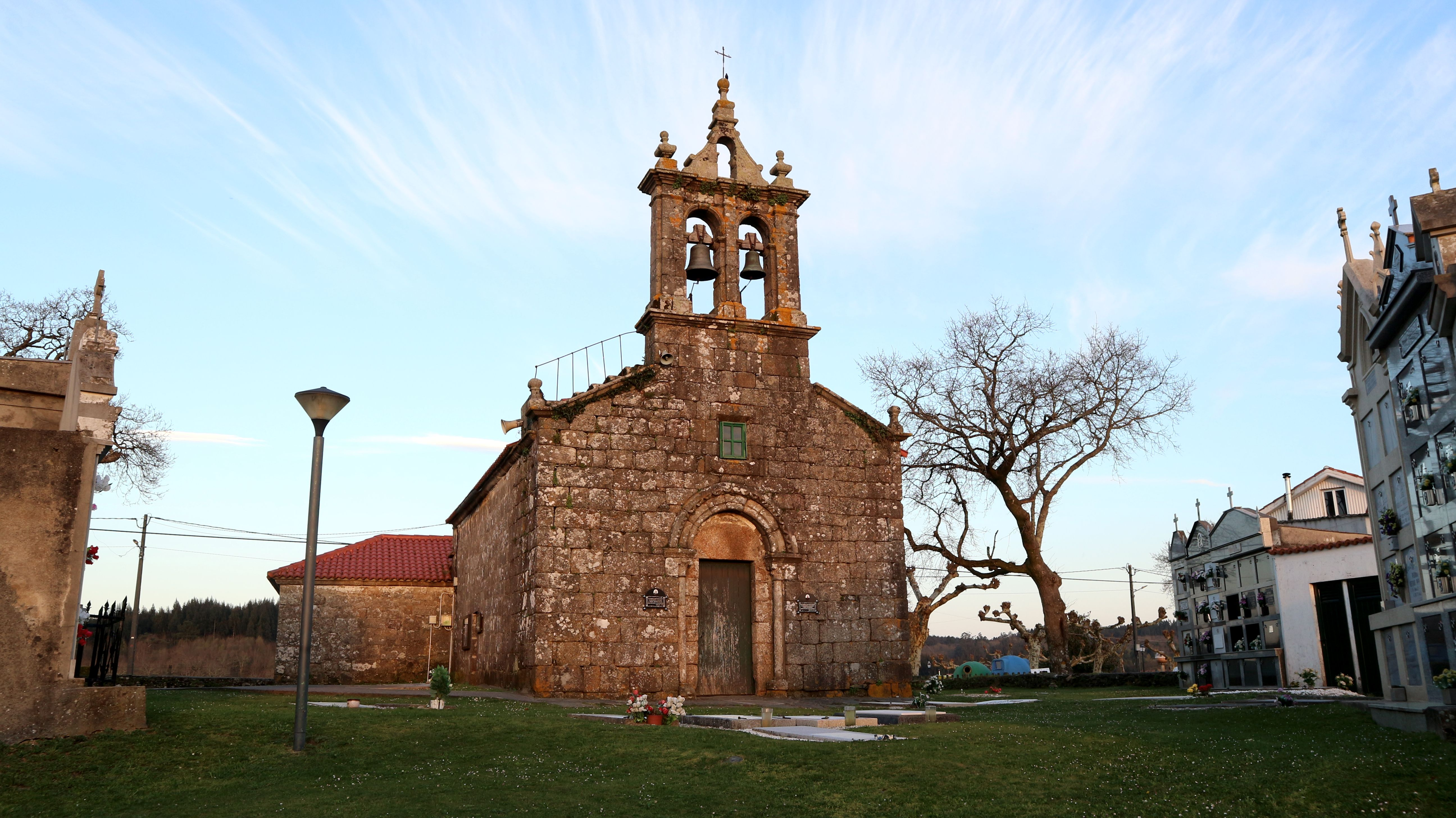 Igrexa de San Paio de Buscás. Buscás, Ordes.